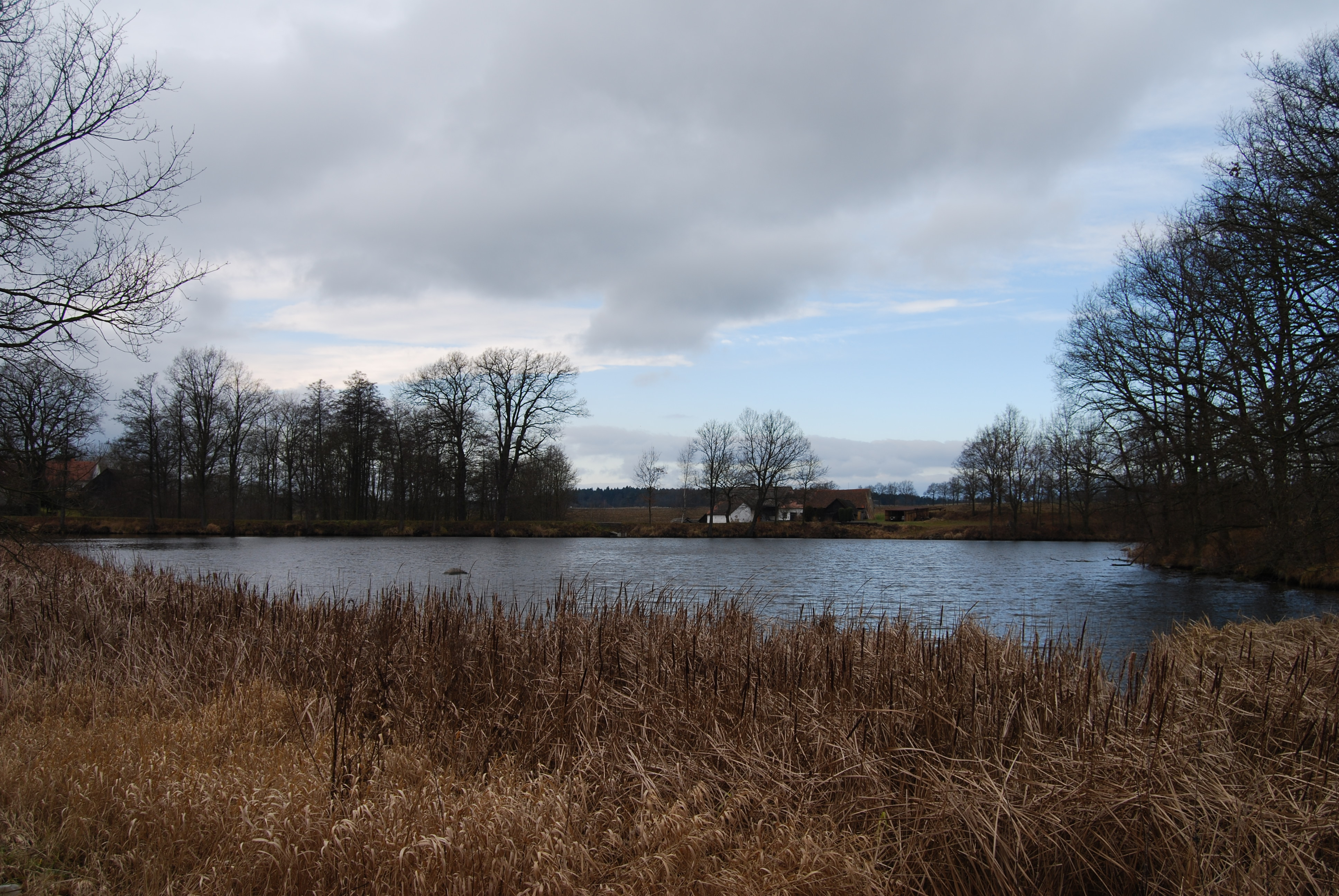 Kotýřina (Kovářov). Kotýřinský rybník. Okres Písek. Česká republika.